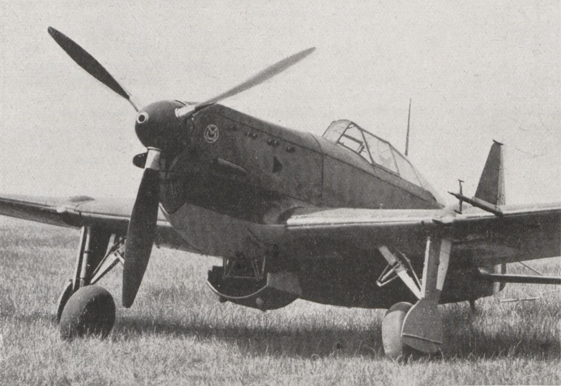 Un aspect partiel du monoplace de chasse MORANE-SAULNIER 405, à moteur 12 Y.